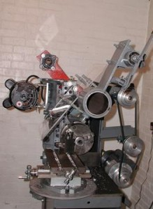 MultiMachine